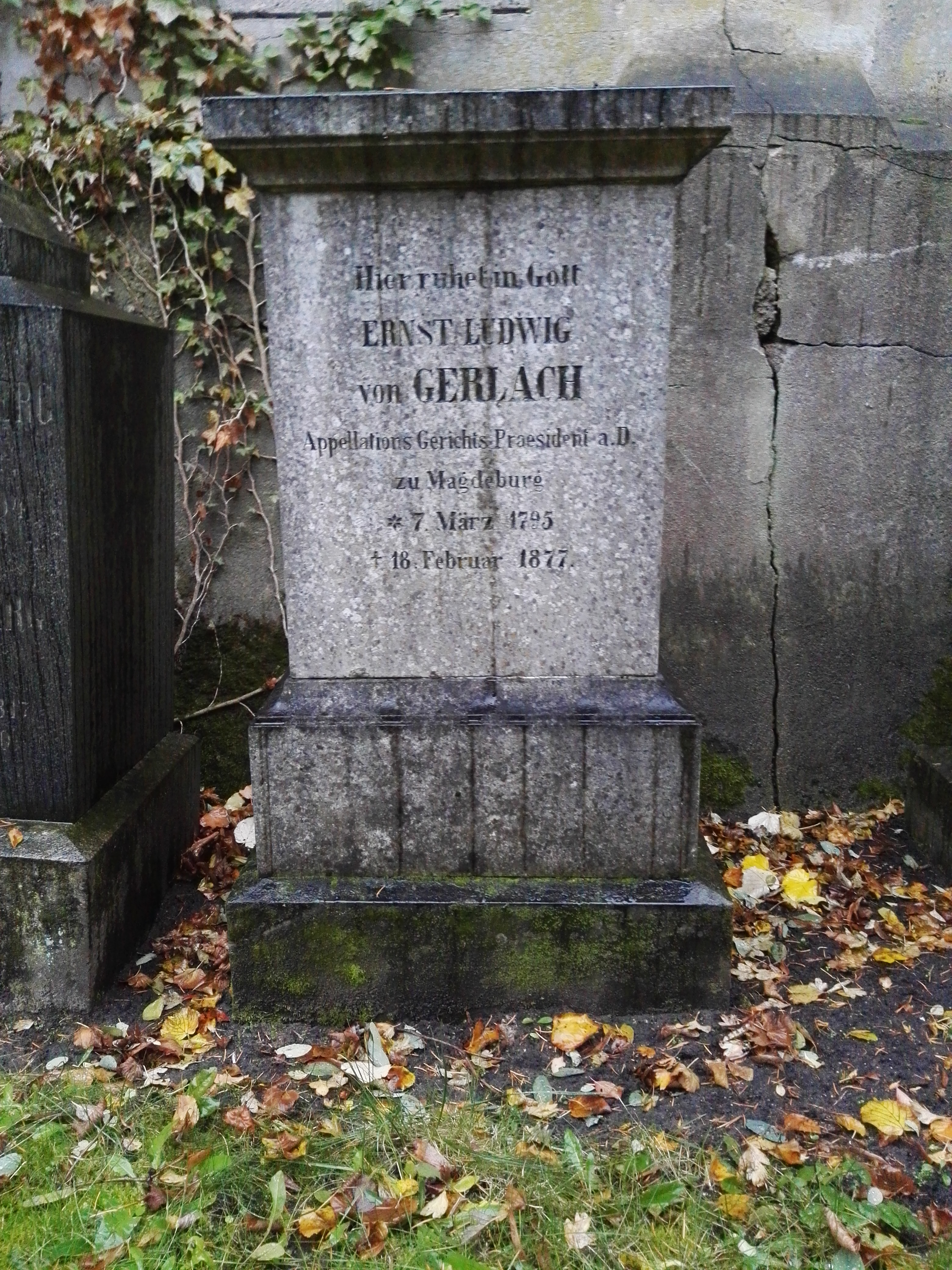 Grab von Ernst Ludwig von Gerlach auf dem Dom-Friedhof II in Berlin-Mitte